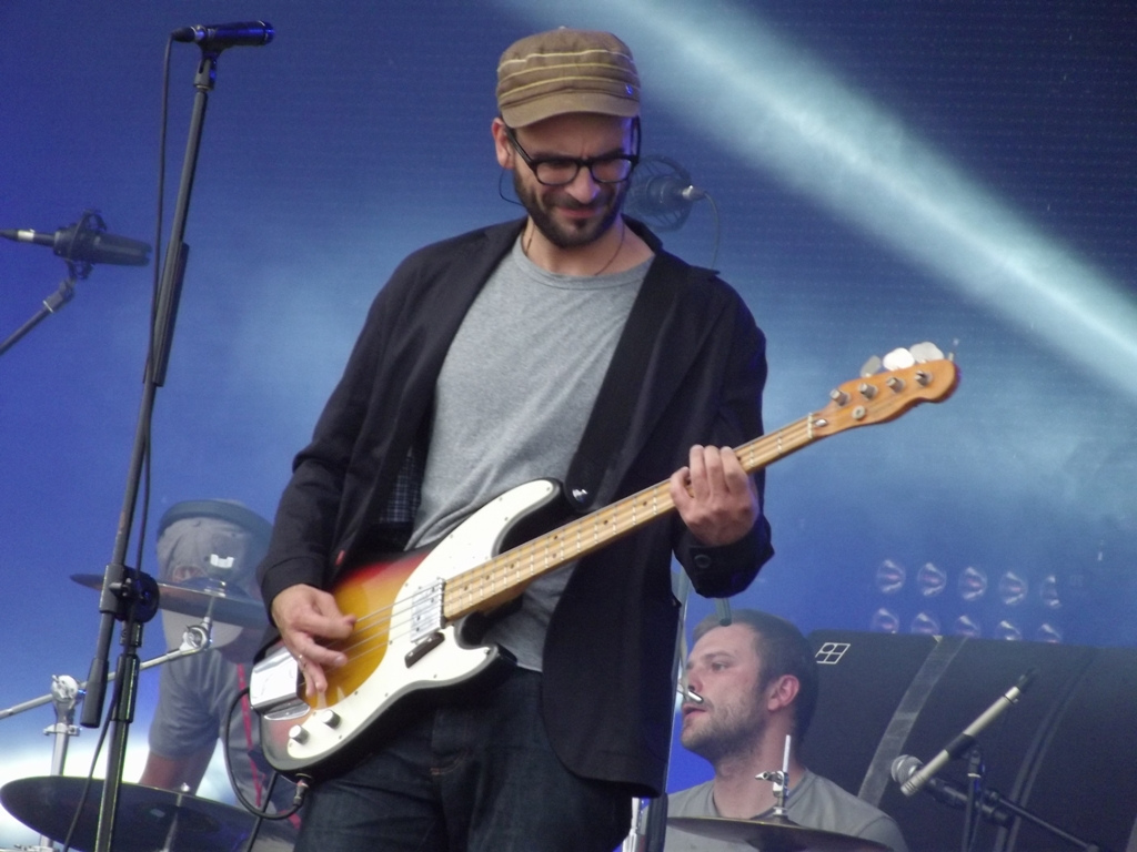 Zdjęcie zrobione podczas pierwszego dnia Coke Live Music Festival 2012 w Krakowie.